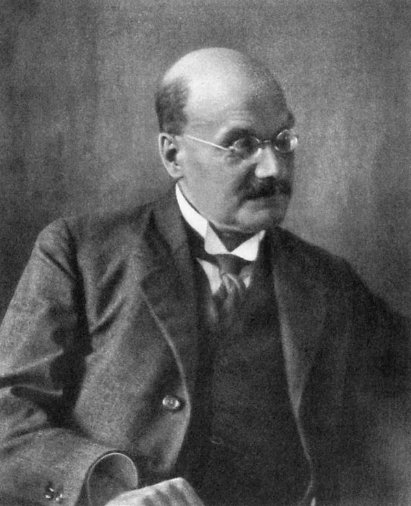 Wilhelm Spiegelberg, German egyptologist